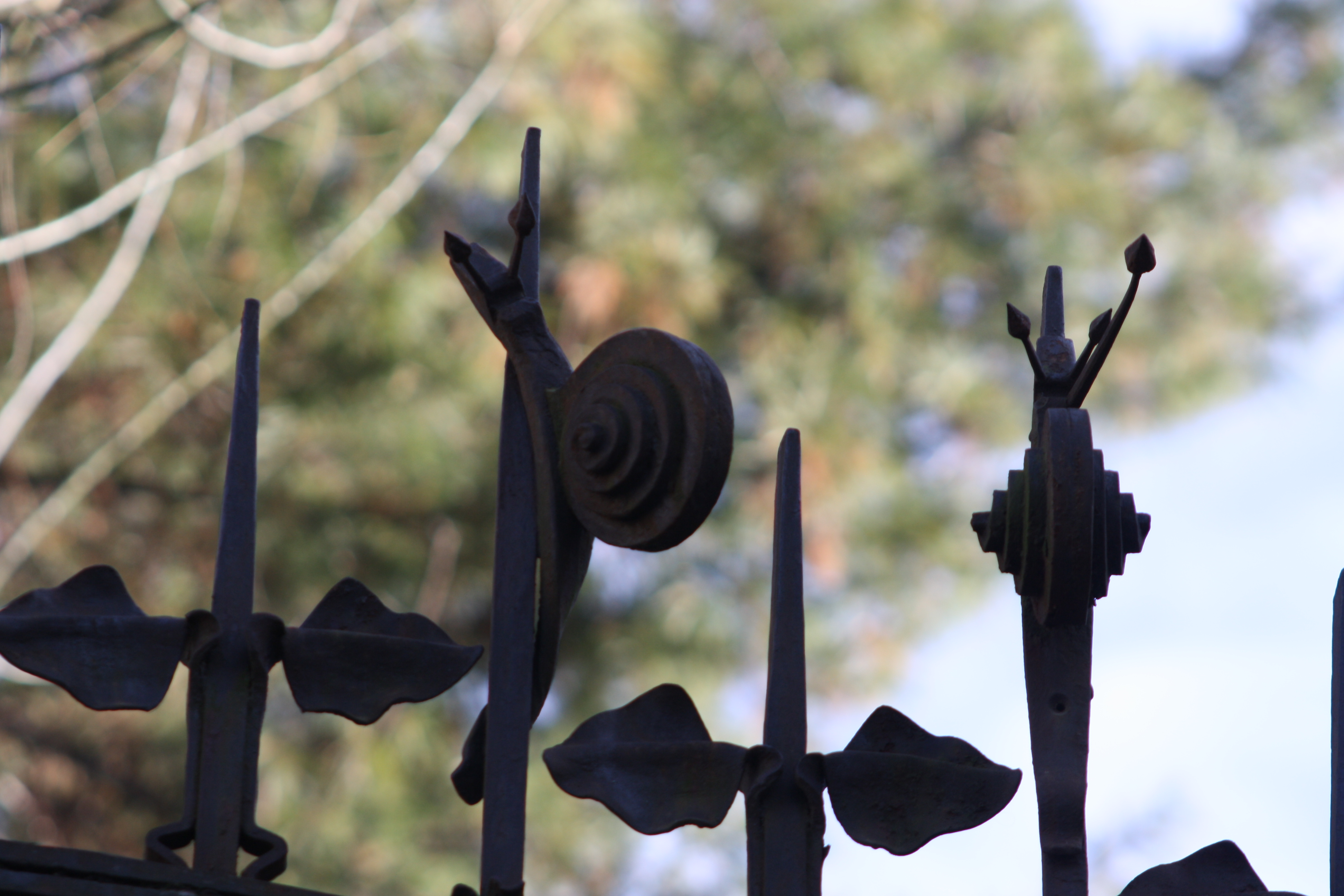 Ferri battuti a forma di chiocciole sul cancello orientale di villa Ottolini-Tovaglieri a Busto Arsizio